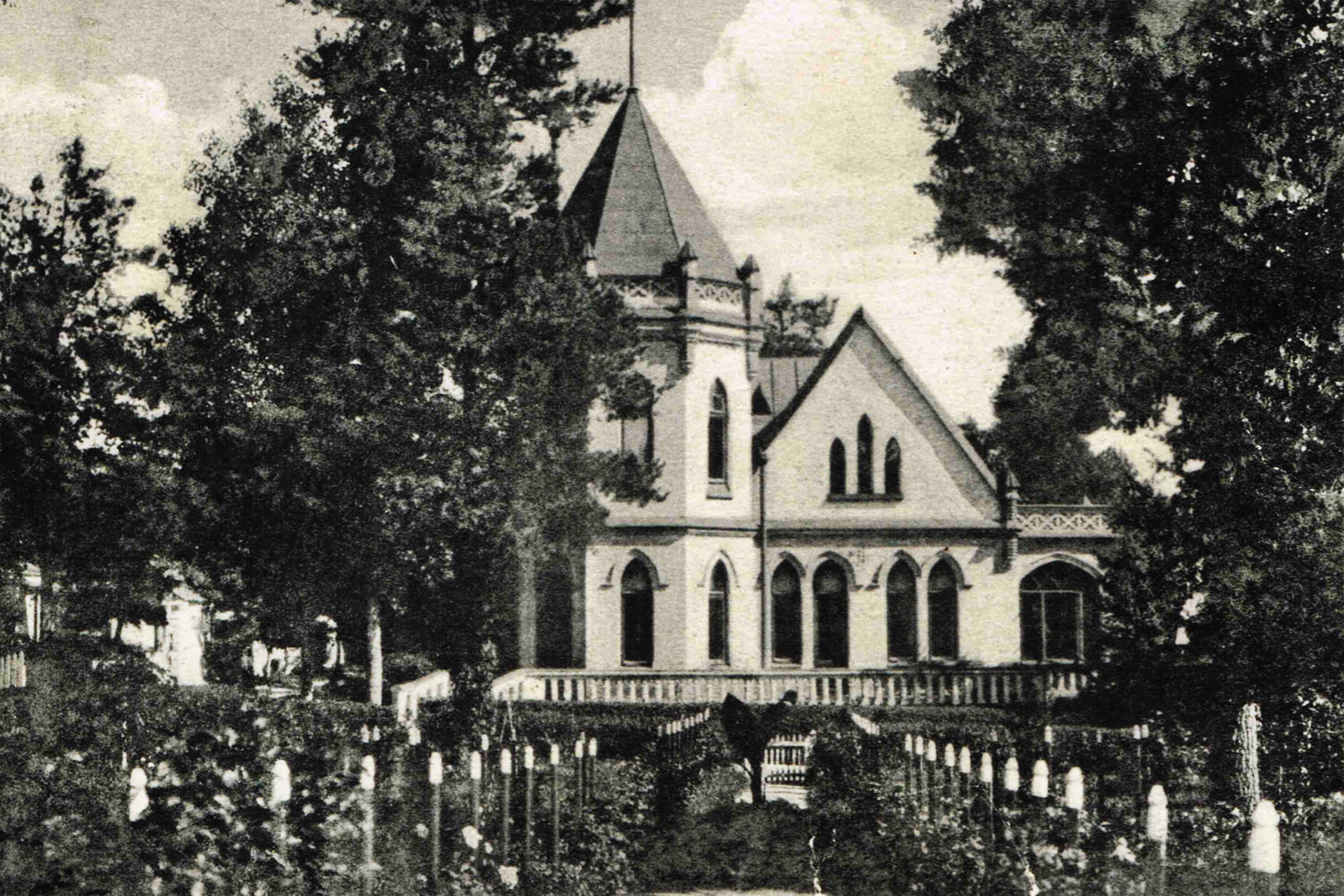 Дача в Бучі